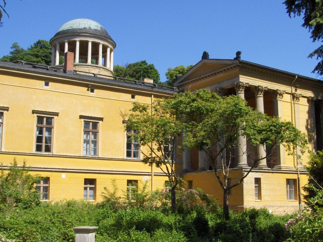 Schloß Lindstedt in Potsdam Parkseite